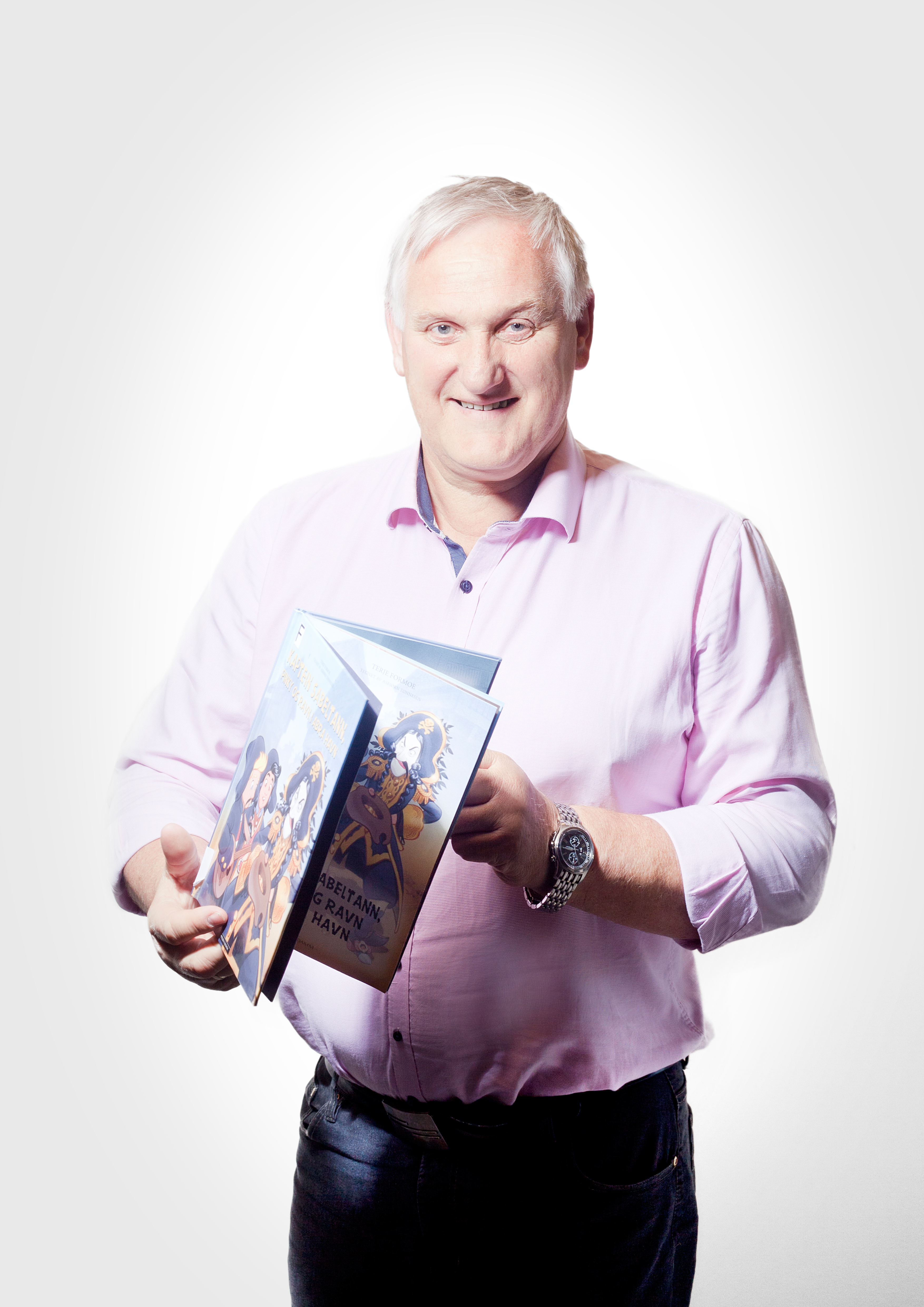 Ordfører Reinert Eidshaug fra Vikna, Nord-Trøndelag. Bildet er tatt i forbindelse med Nord-Trøndelag fylkesbiblioteks kampanje "Leseambassadører"